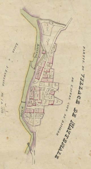 Mapa extret del Cadastre Napoleònic del 1812, conservat als Arxius Departamentals dels Pirineus Orientals (ADPO)